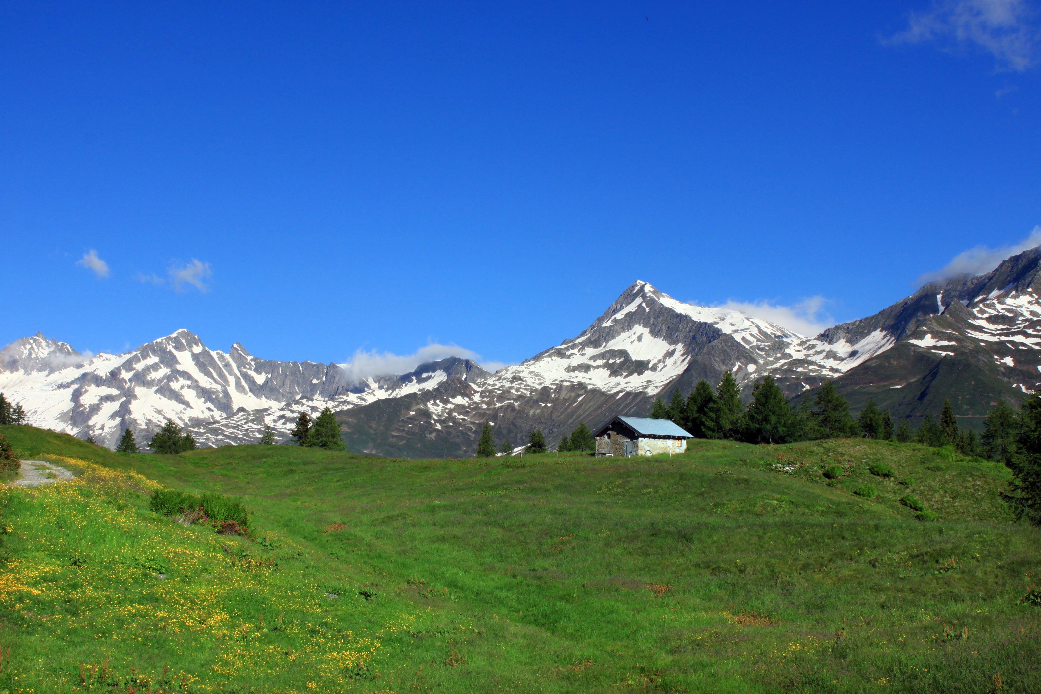 Blick in Richtung Gotthardmassiv von der Alpe di Pesciüm (1745 m.ü.M.) aus. Die schöne Alm liegt oberhalb von Airolo im Schweizer Kanton Tessin.